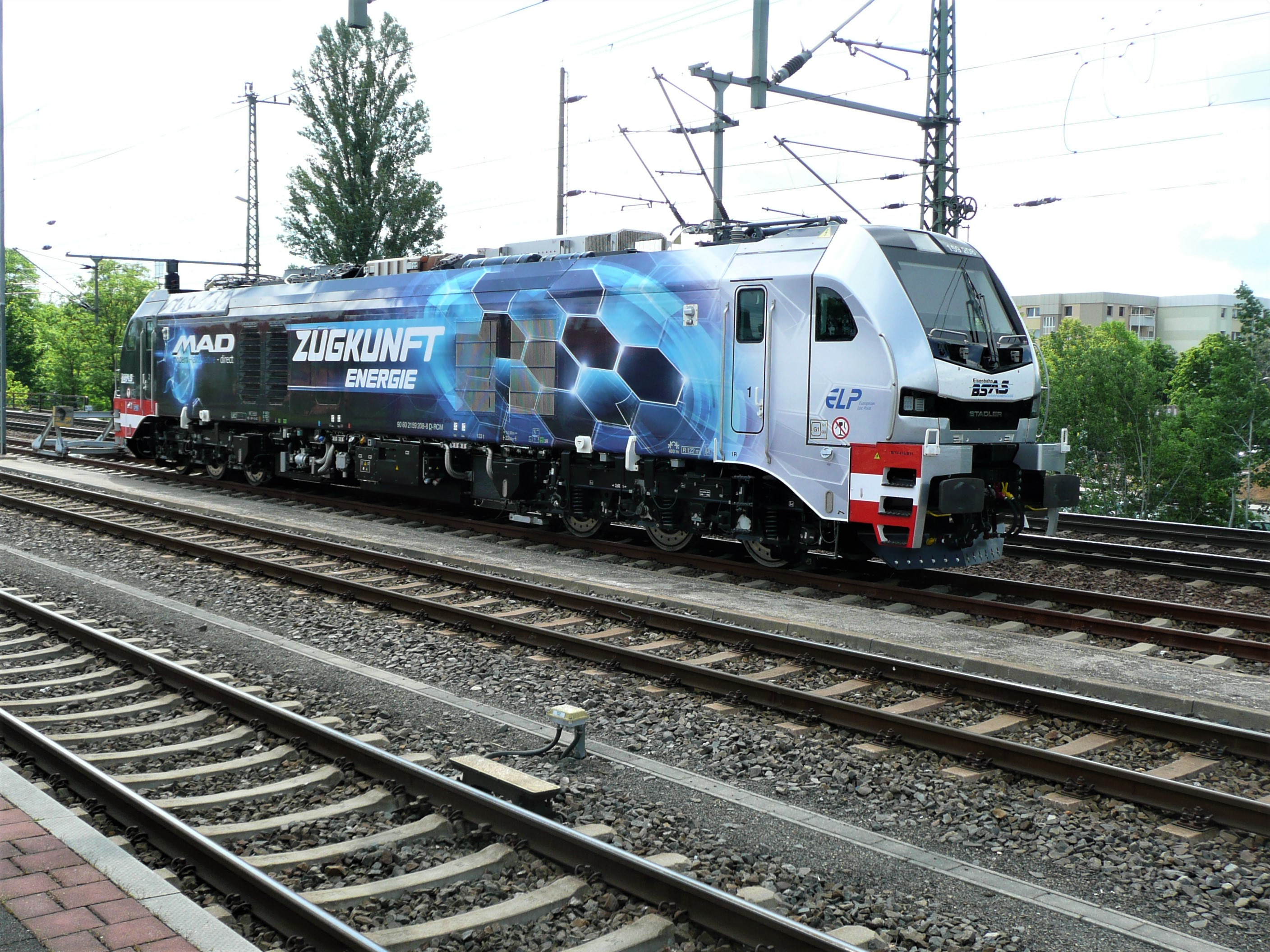 Stadler Eurodual 2159 208, abgestellt in Dresden Hauptbahnhof